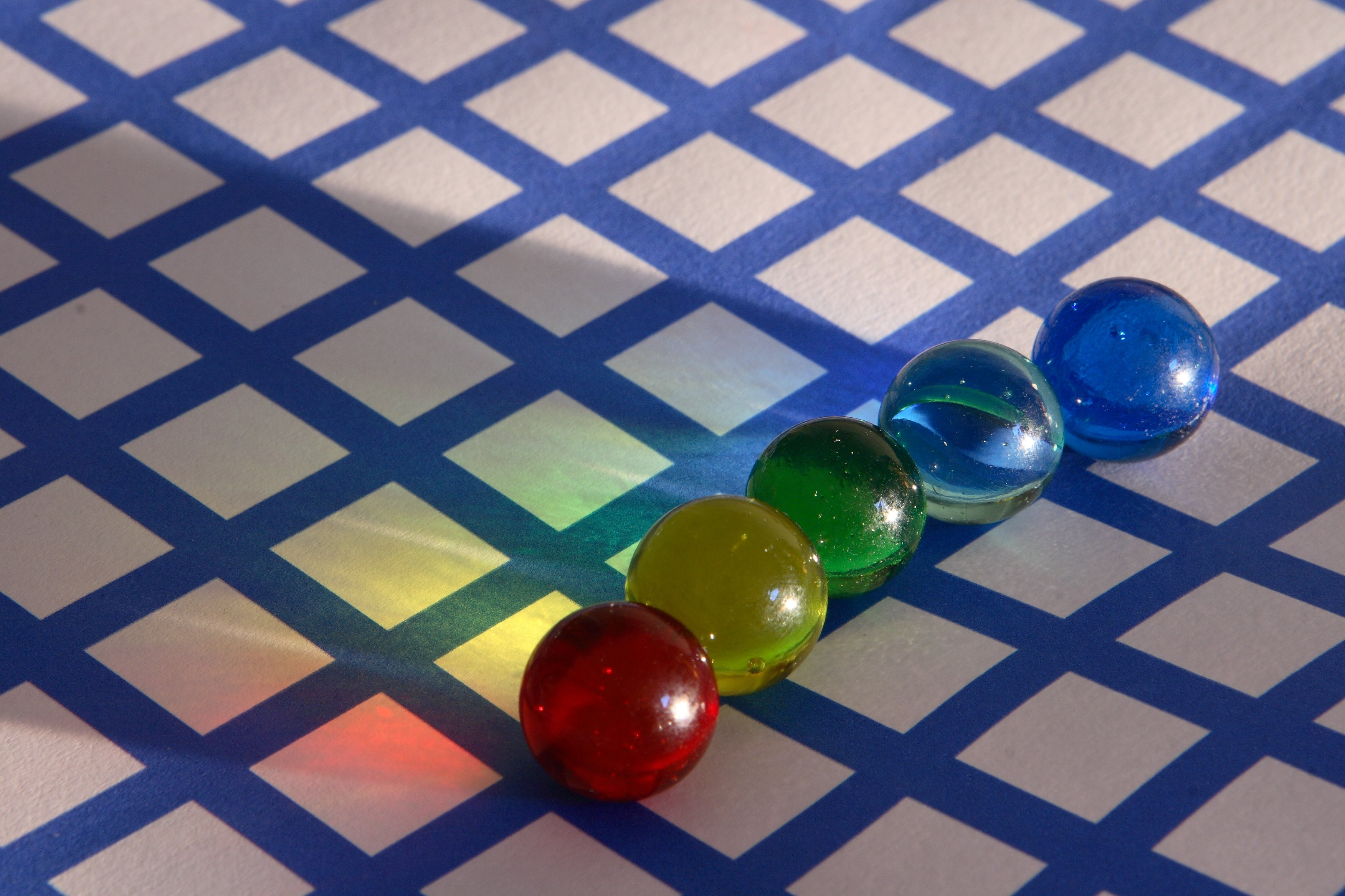 5 Glasmurmeln auf kariertem Grund, welche seitlich angestrahlt werden